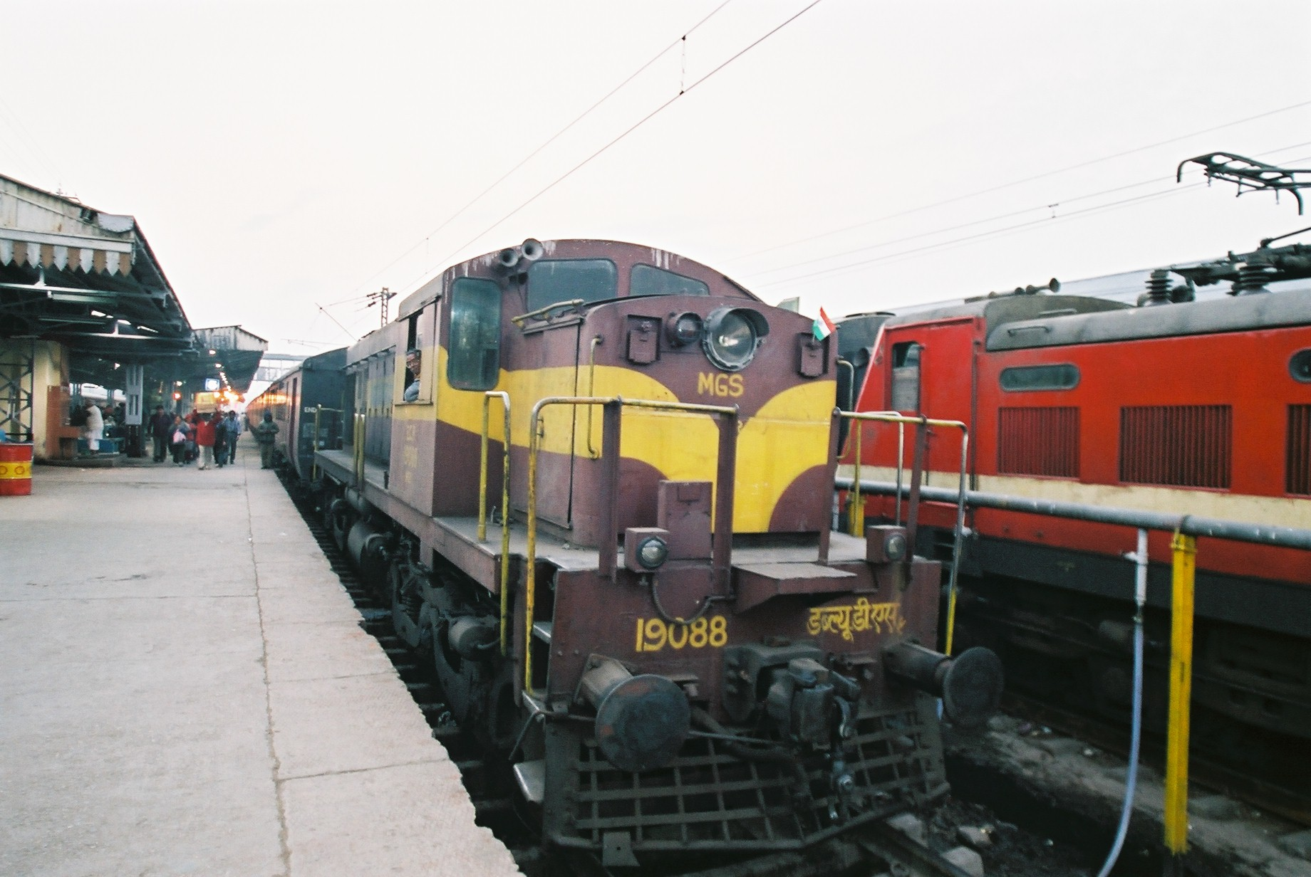 マハーボディ・エクスプレスを牽引してきた機関車 (2005/01/26 Mughal Sarai, Uttar Pradesh, INDIA)